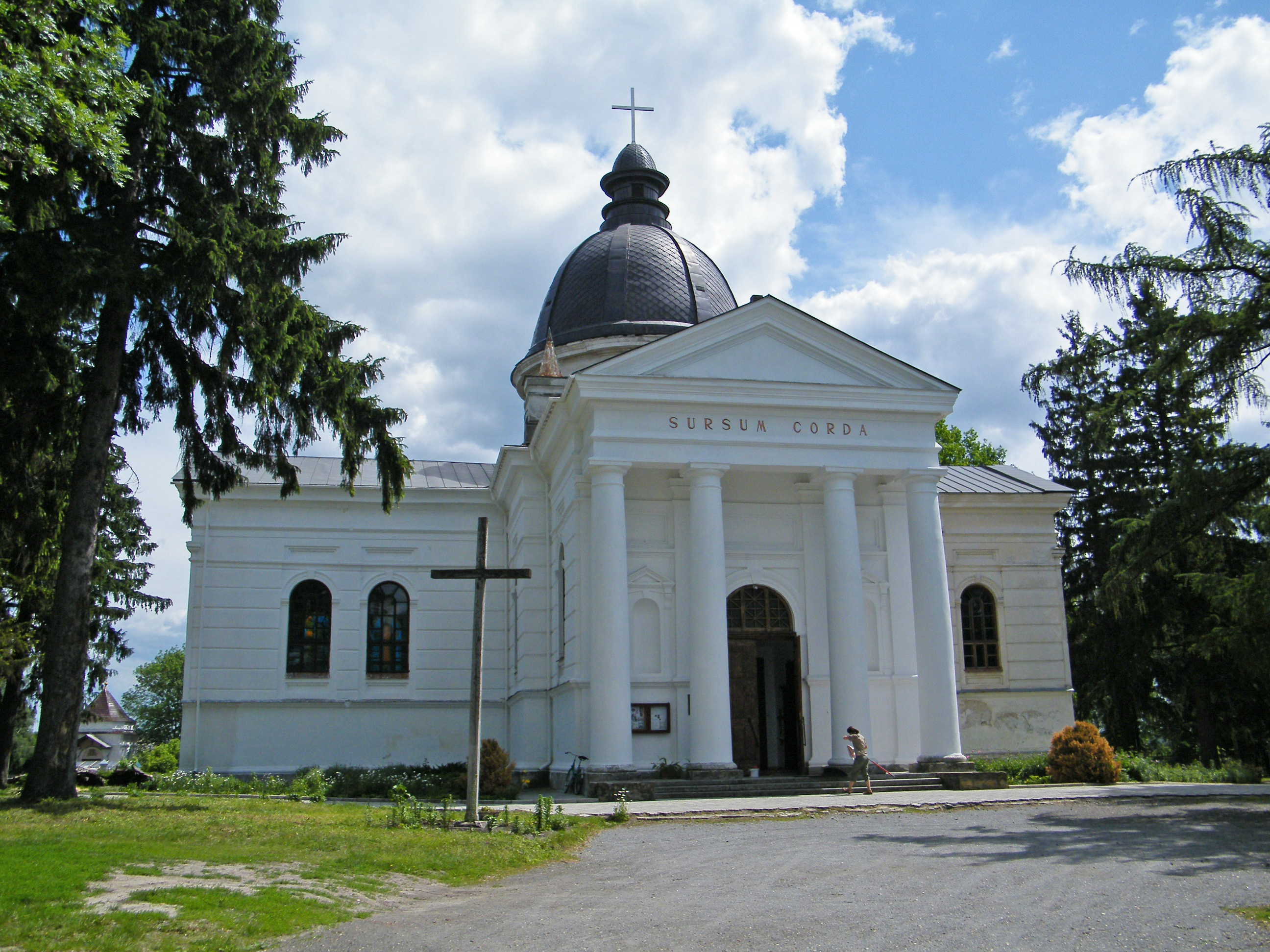 Католический Успенский костел